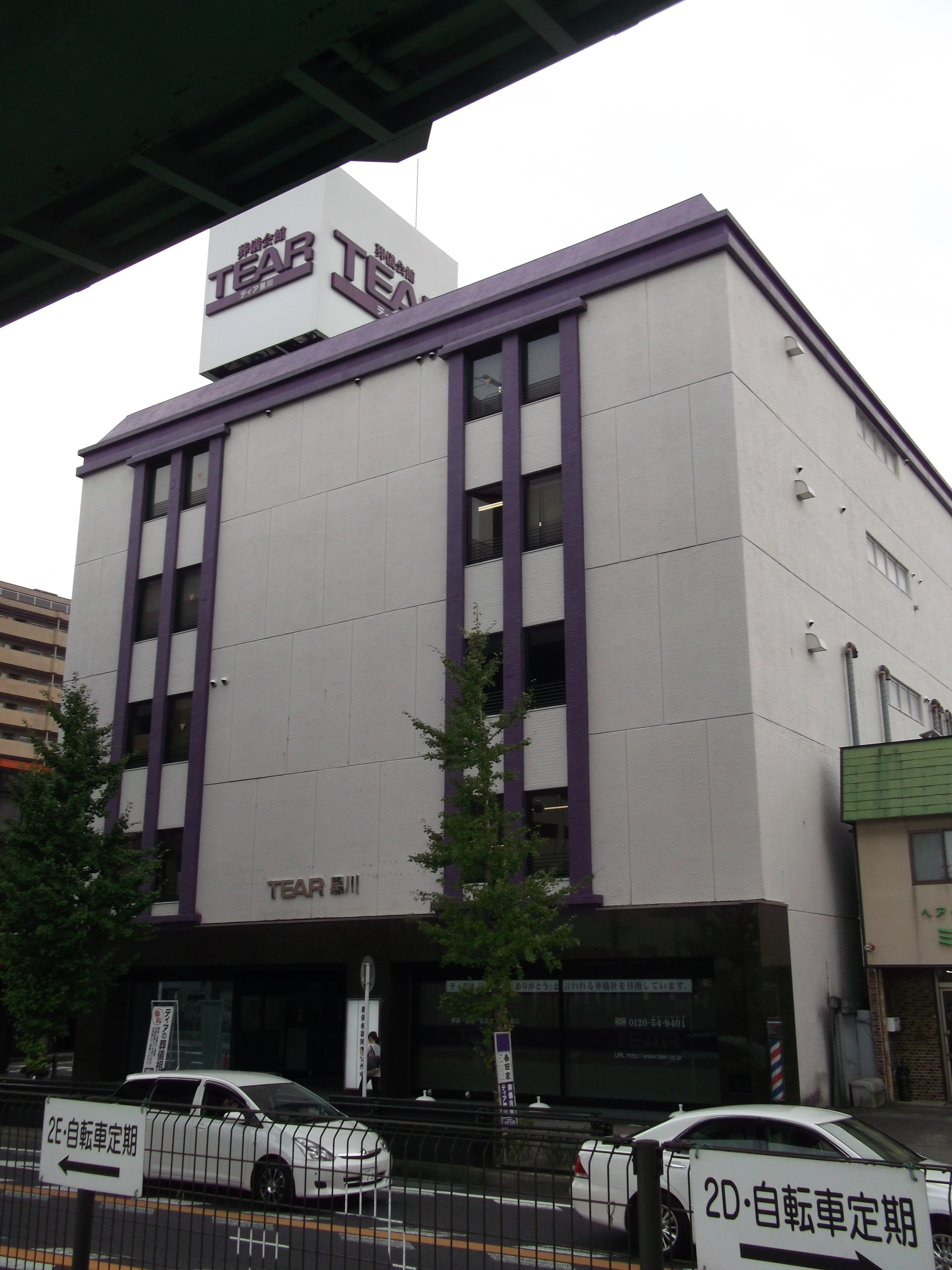 名古屋市北区黒川本通にある葬儀会館ティア黒川および本社